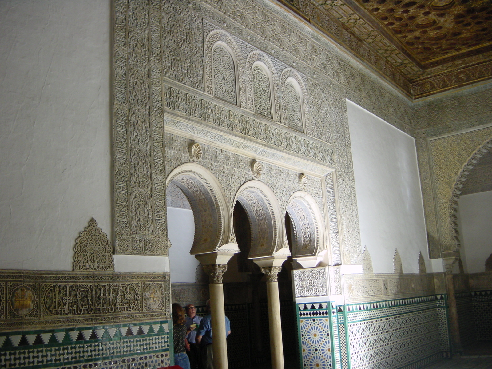 Alcázar de Sevilla, Andalucía